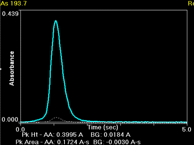 Das Bild zeigt das zeitaufgelöste Signal einer Bestimmung von Arsen in wässriger Lösung. Das weiße, gestrichelte Signal zeigt das Zeeman-Untergrundsignal, das blaue Signal zeigt das korrigierte Signal, das sich aus der Gesamtabsorption − Untergrundabsorption ergibt.